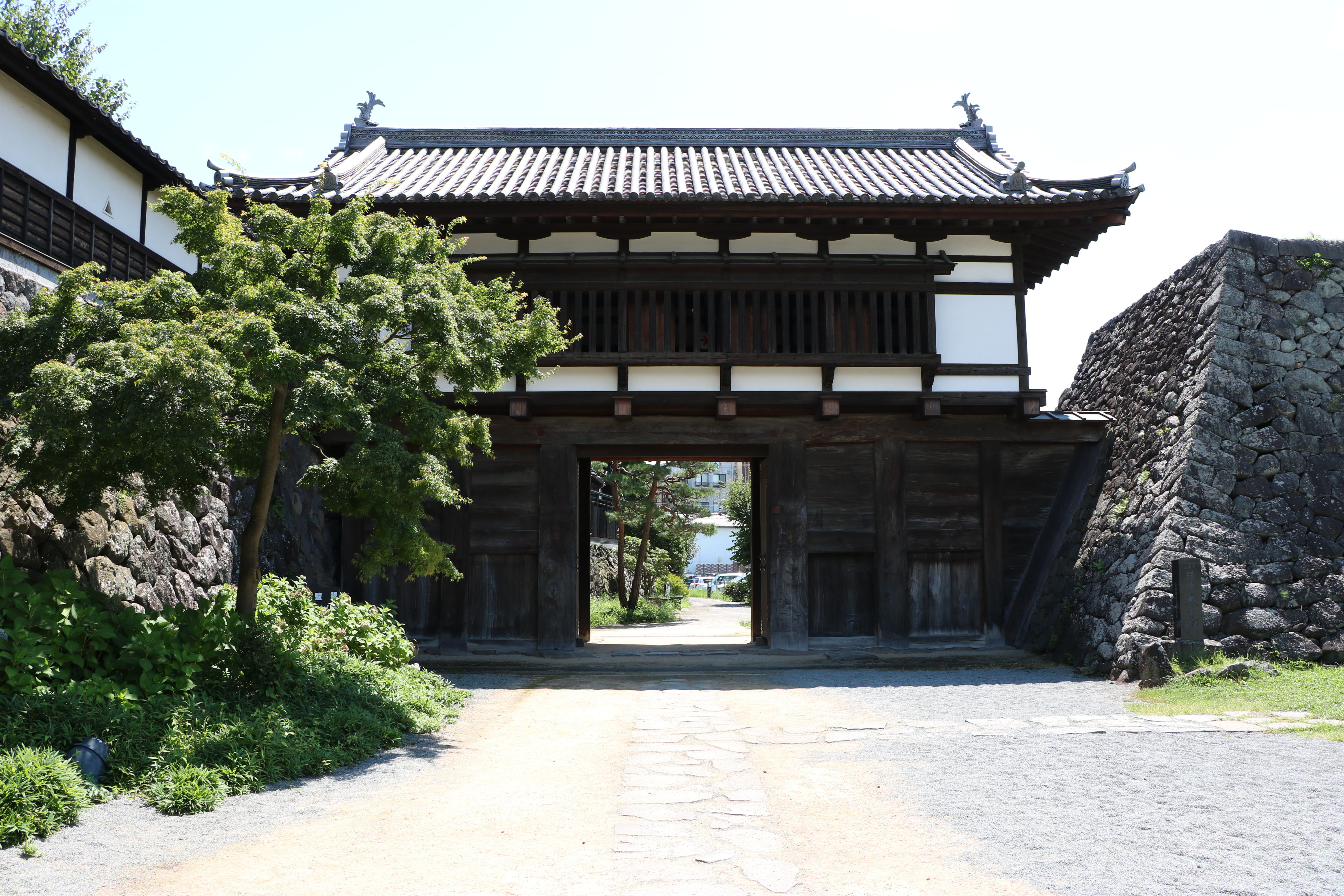 小諸城大手門裏側（長野県小諸市）